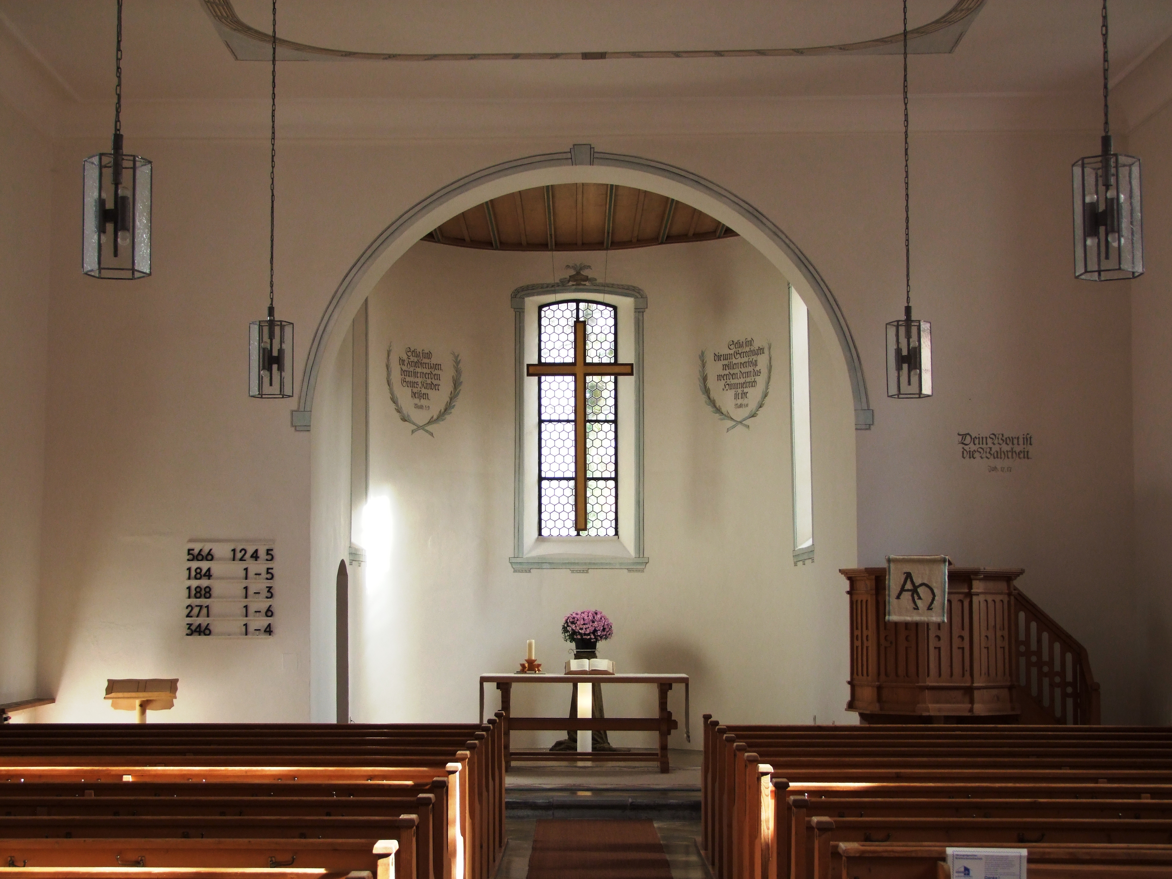 Evangelisch-reformierte Kirche, ehemalige Spitalkirche in Bad Grönenbach.